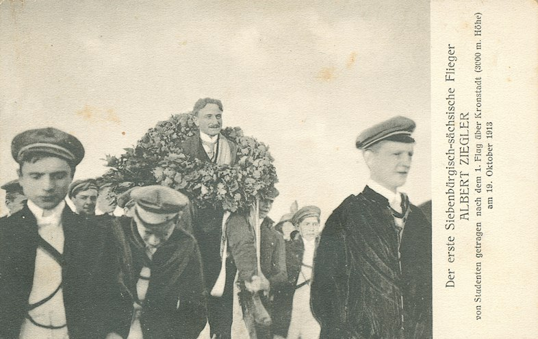 Albert Ziegler von Studenten getragen nach seinem 1. Flug